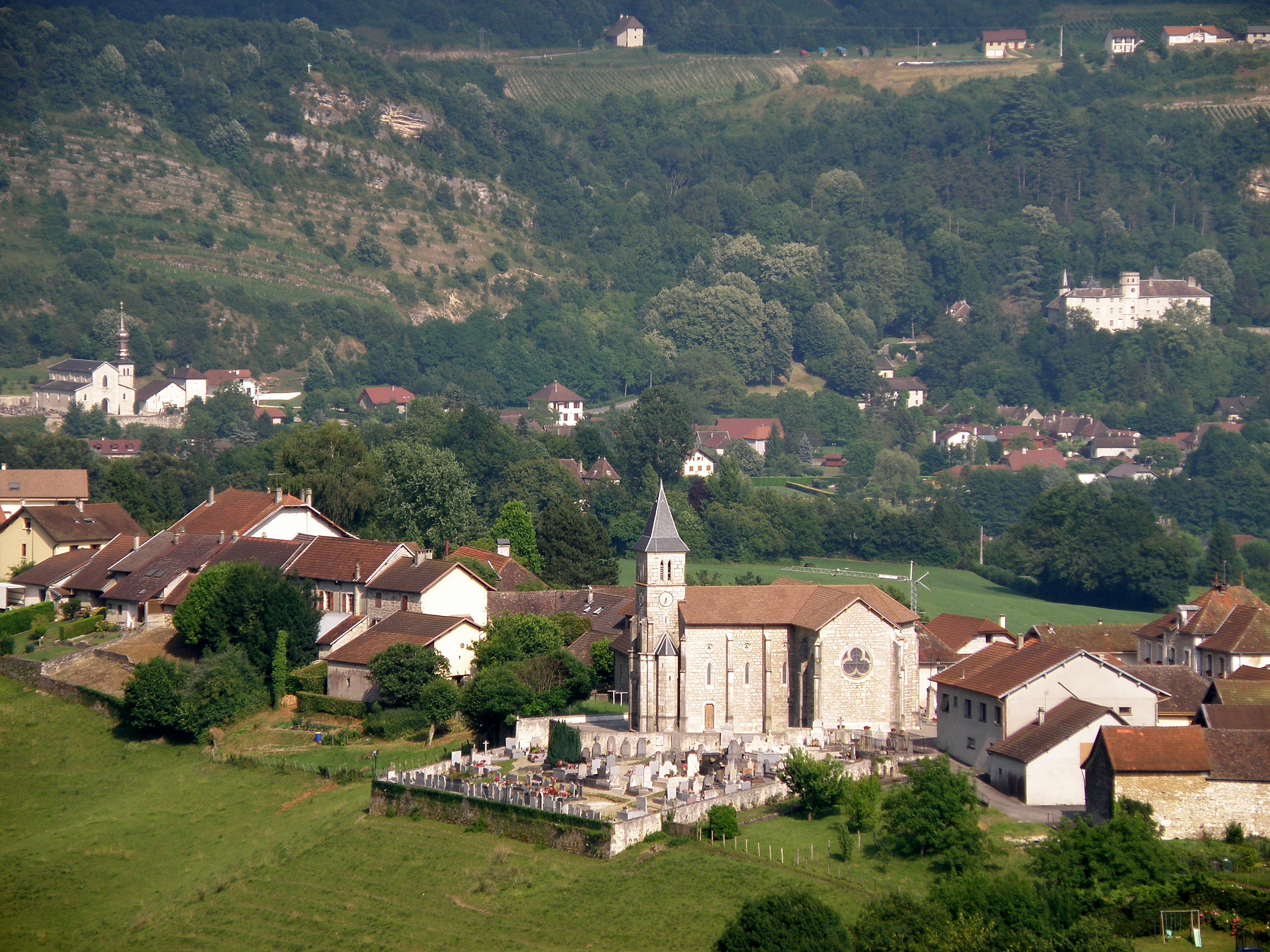 Massignieu-de-Rives, comm. du département de l’Ain (région Rhônes-Alpes, France). Vue générale du bourg-centre. Plus loin, le village de Lucey, avec son église Saint-Étienne (à gauche) et son château (à droite).